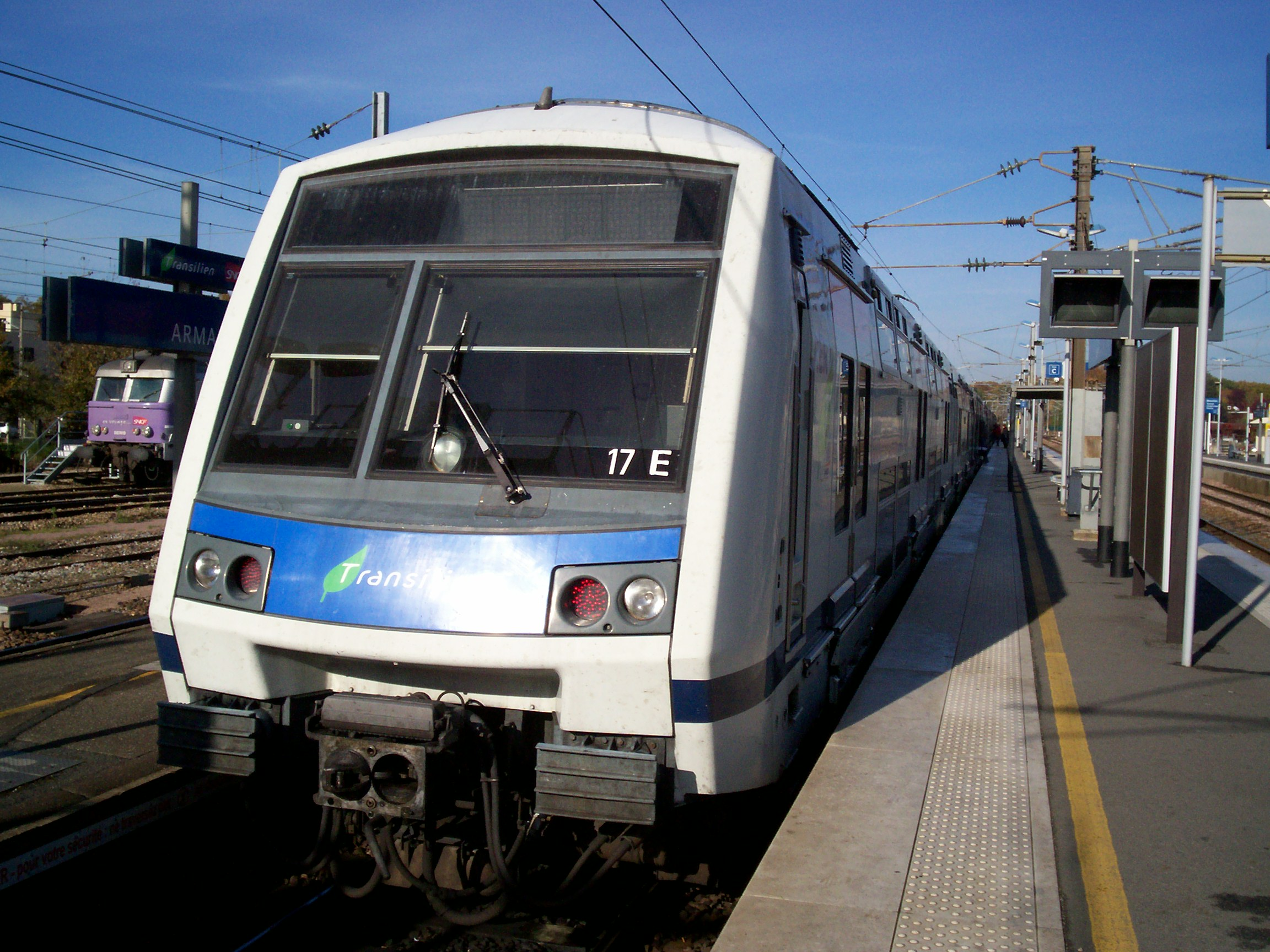 Z 22500 et BB 67400 à Gretz-Armainvilliers